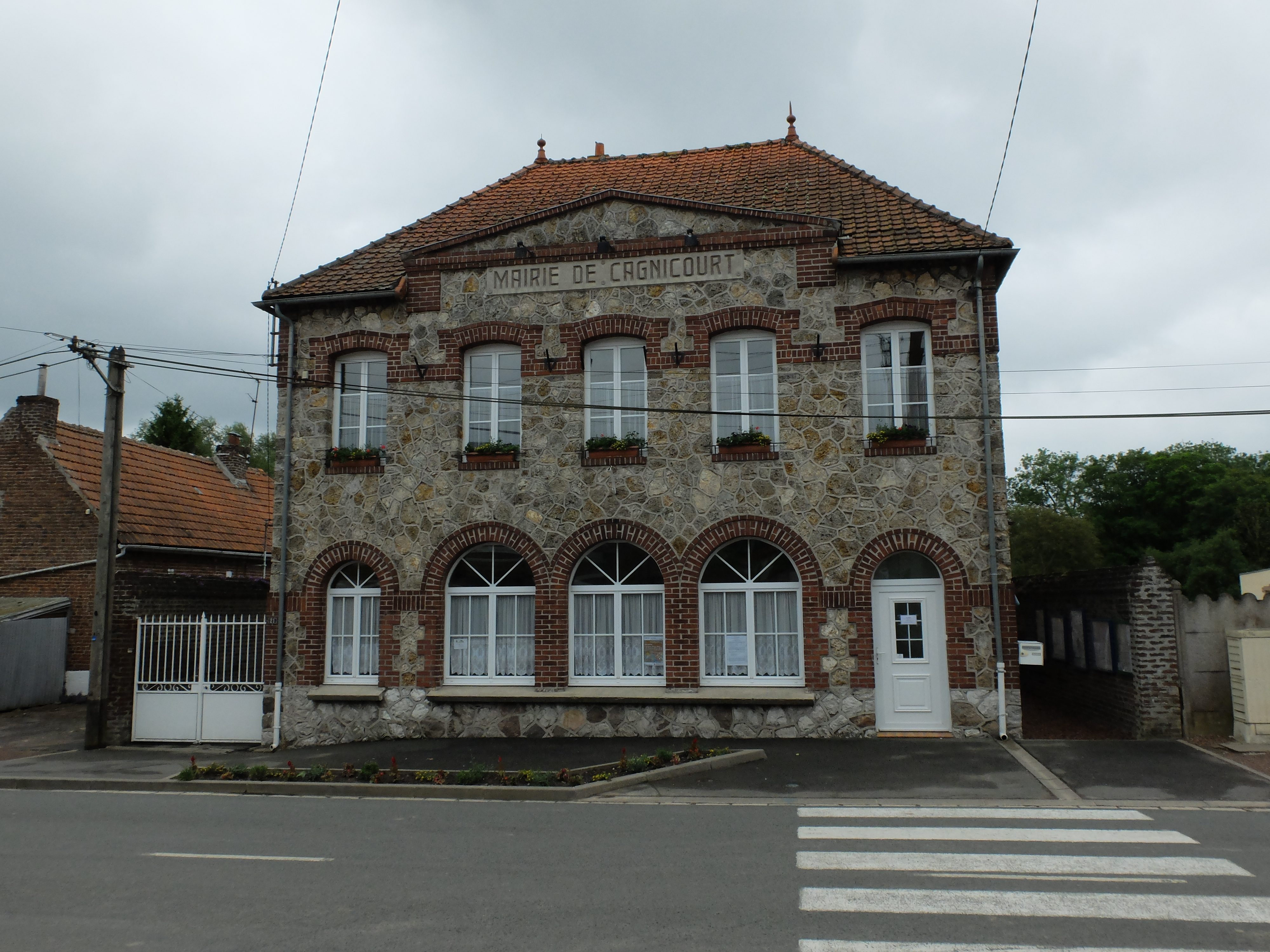 Vue de la mairie de Cagnicourt.